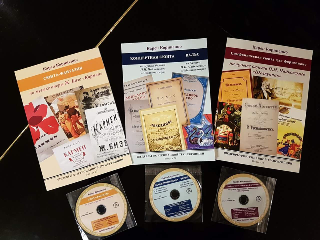 Новые Нотные сборники Транскрипций Карена Корниенко, вышедшие в 2017 году.